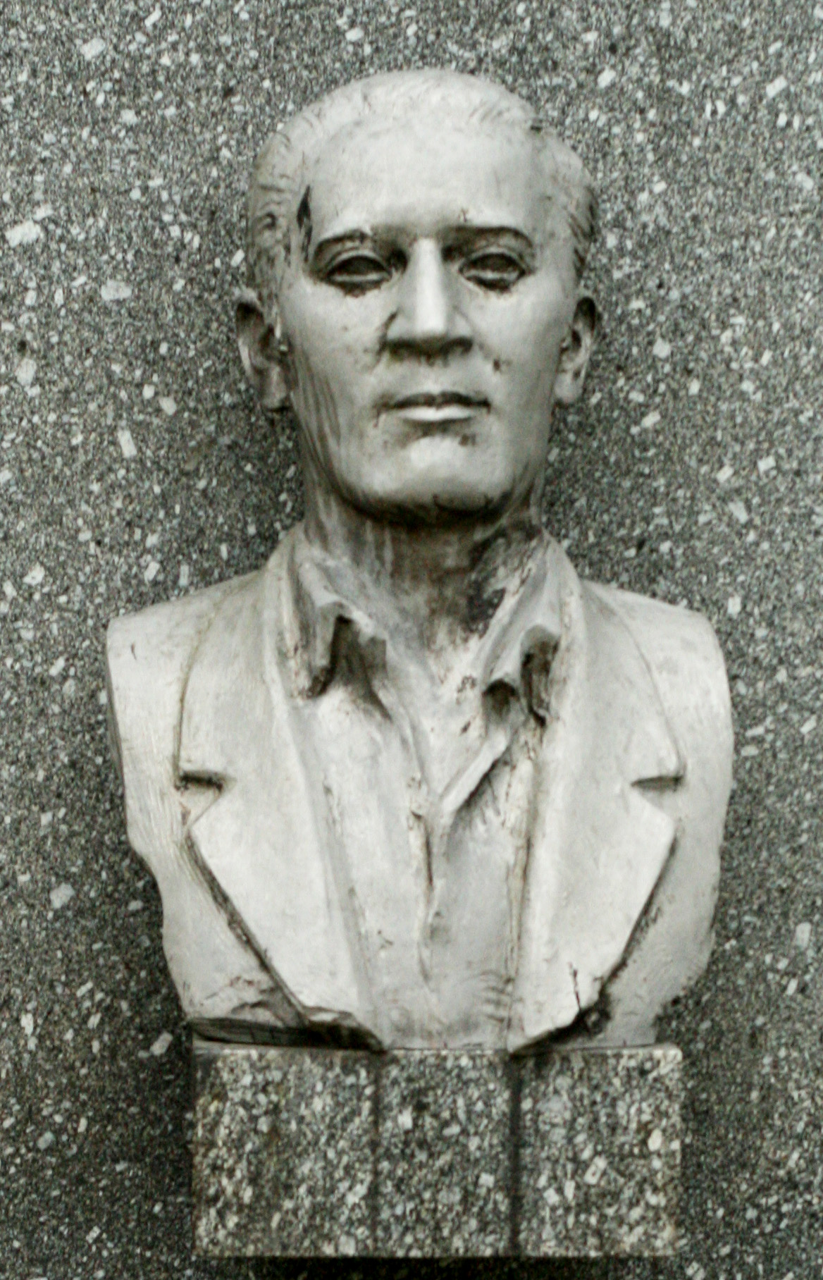 Dukla, Alej hrdinov kapitán Vendelín Opatrný